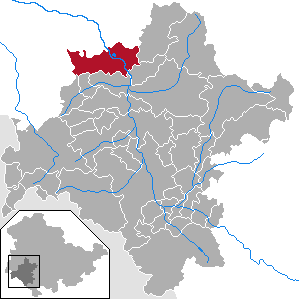 Breitungen/Werra in Thuringia - District Schmalkalden-Meiningen